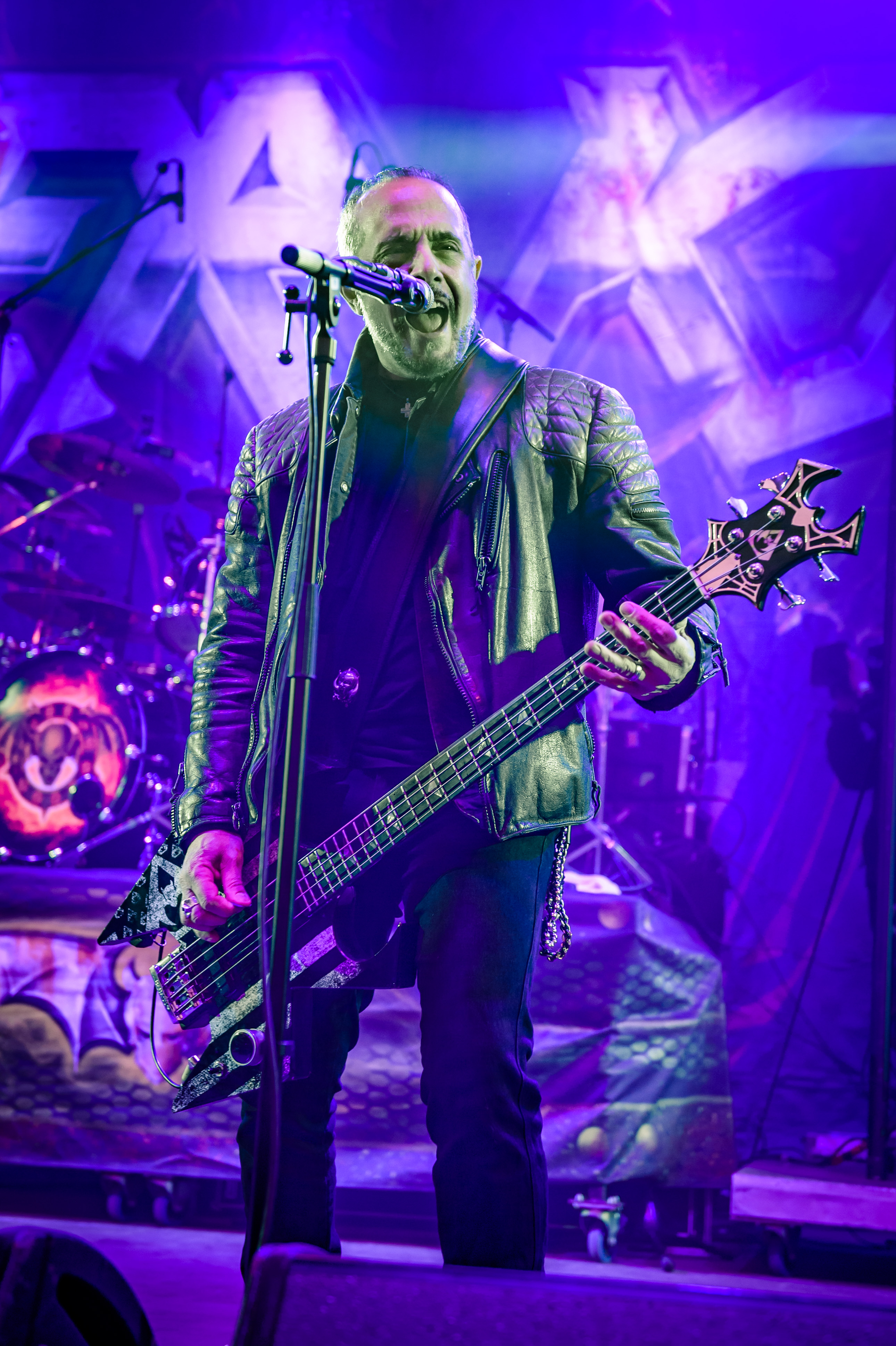 'Rock Hard Festival 2018; Amphitheater Gelsenkirchen': 'Overkill'